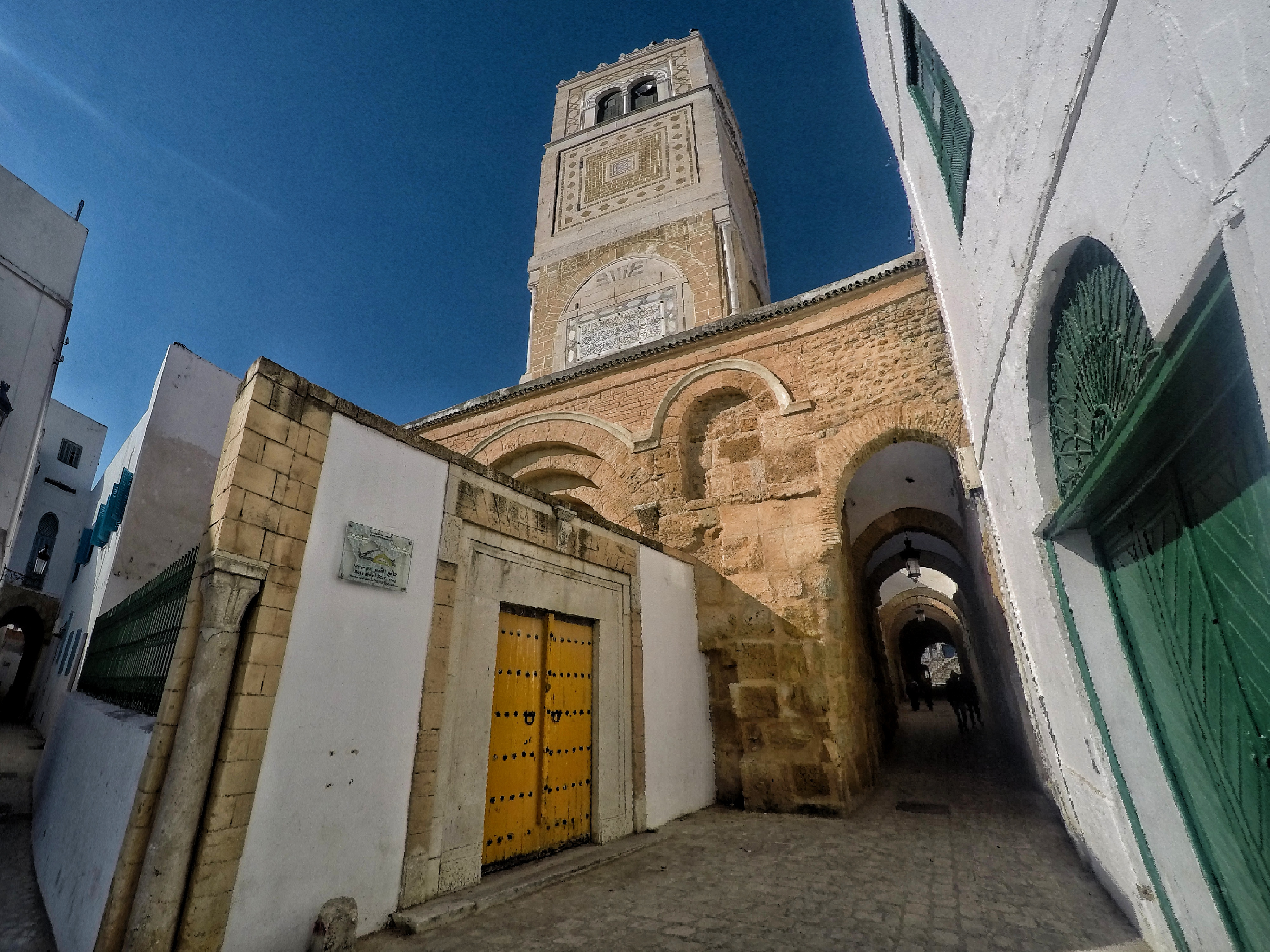 Mosquée d'El Ksar